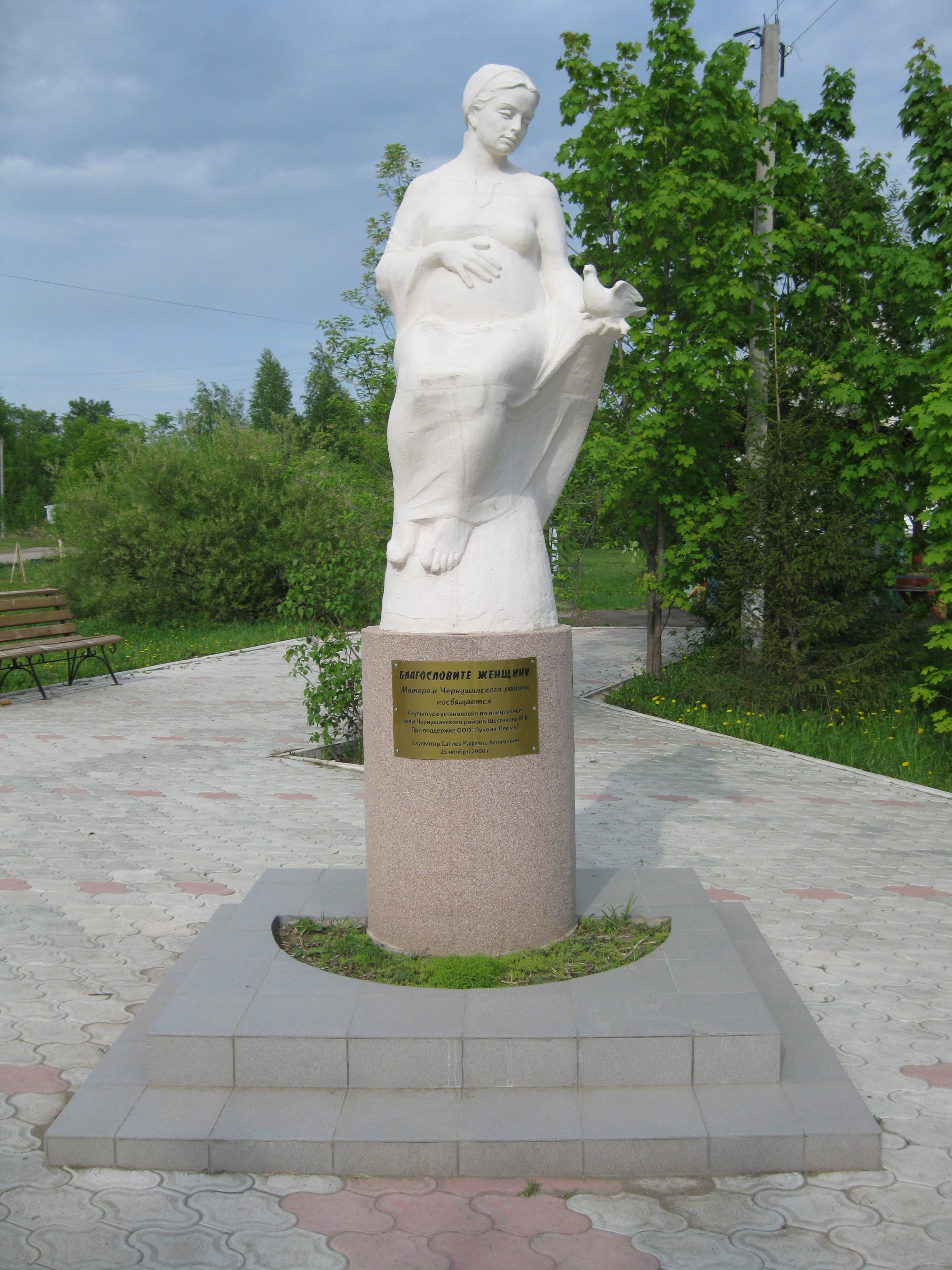 "Благословите женщину". Матерям Чернушинского района посвящается. Скульптор Сатиев Рафаэль Аслямович. 25 ноября 2008 года.